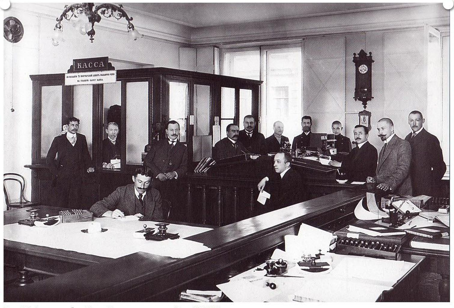 Операционный зал Волжско-Камского коммерческого банка, 1911 год.